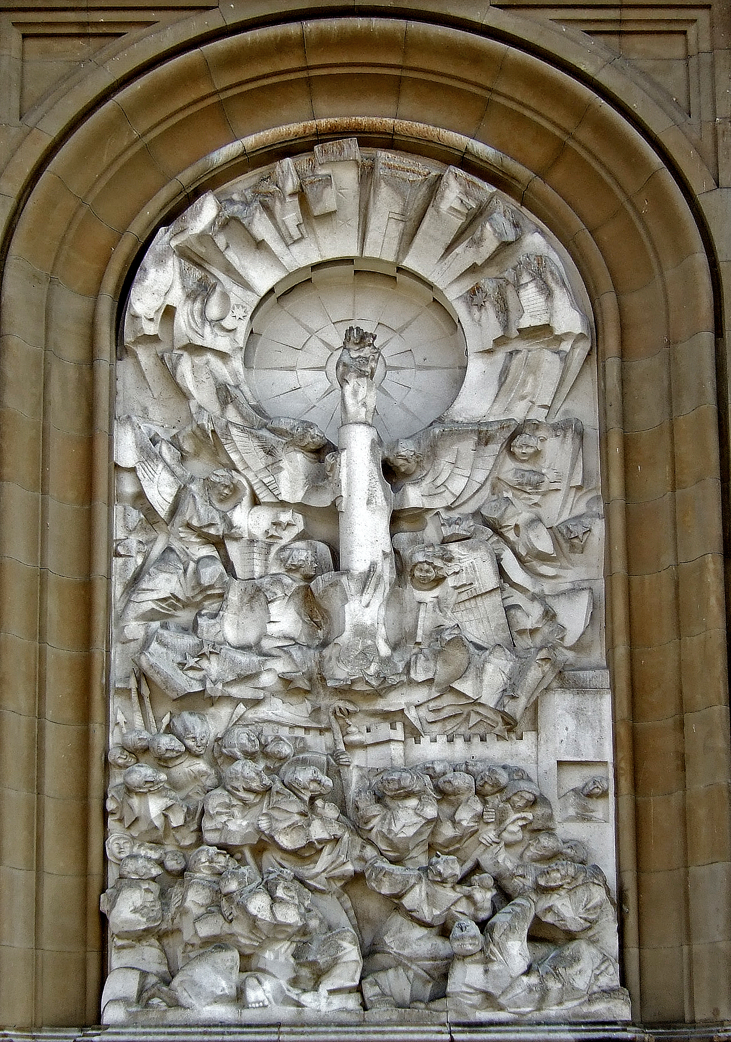 Zaragoza - El Pilar - Relieve de la Virgen de Pablo Serrano